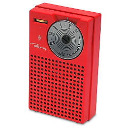 中文（中国大陆）: 口袋型晶体管收音机。